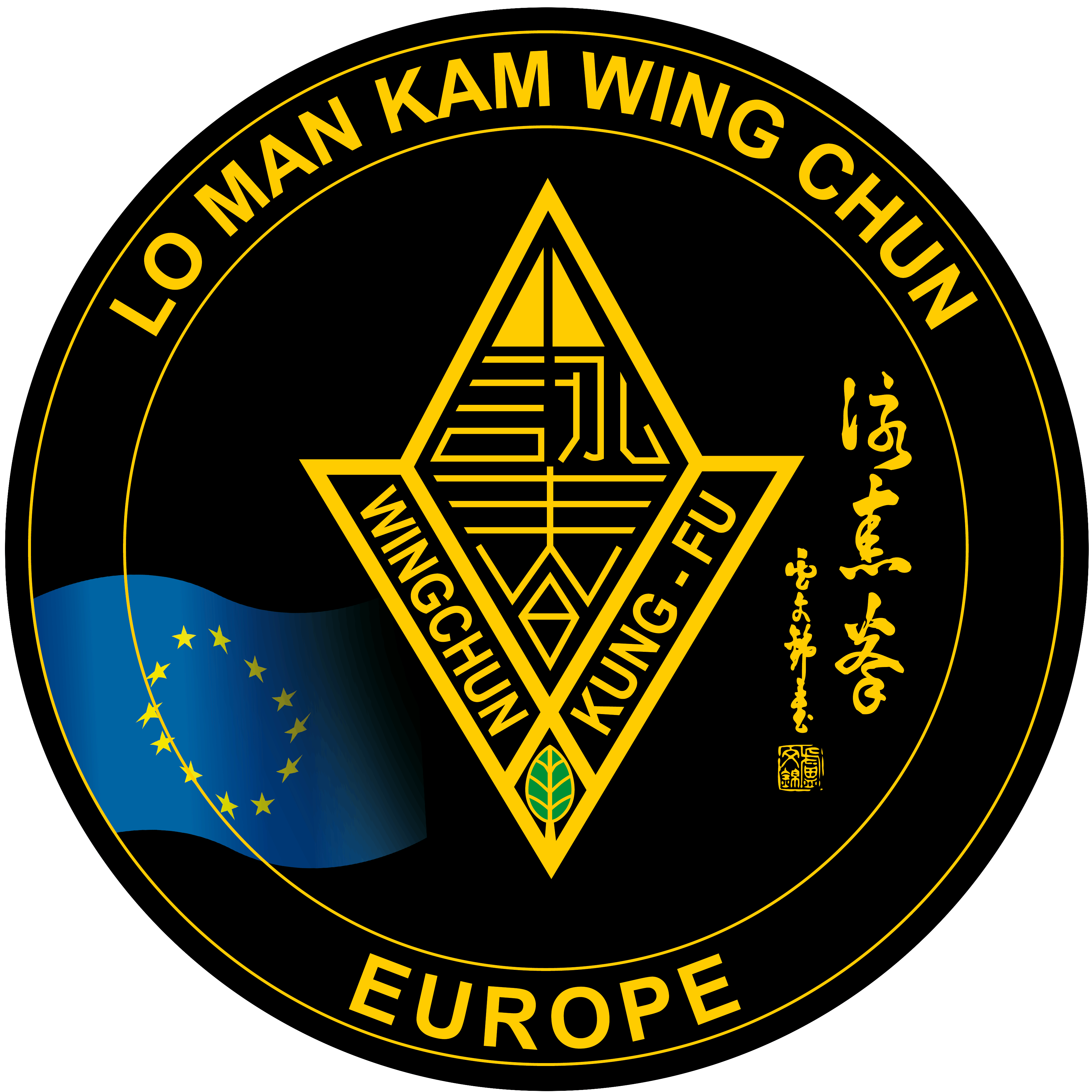 Logo der offiziellen Lo Man Kam Wing Chun Kung Fu Schulen und Vereinigungen